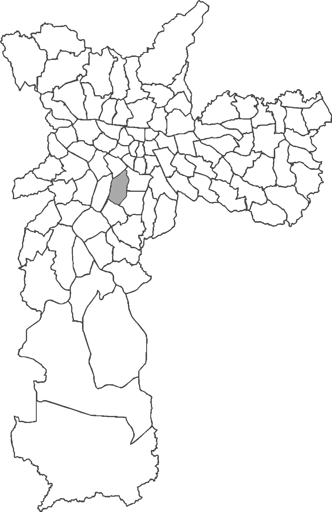 Localização do distrito de Moema no município de São Paulo.